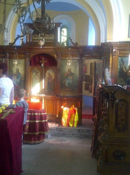 Srpski (latinica): Ikonostas Manastira Sv.Petke Iverice, Sicevacka klisura, Srbija